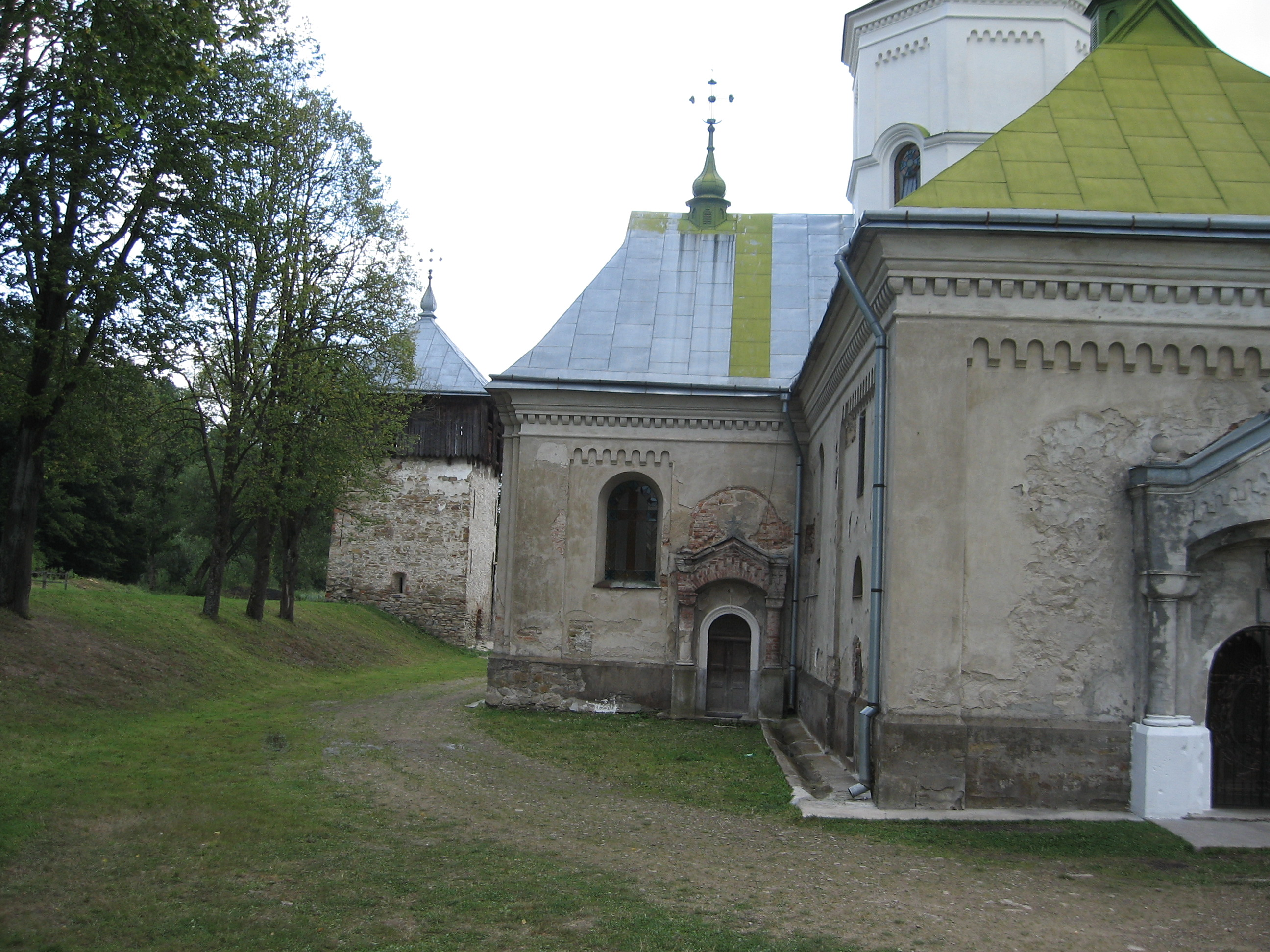 Лаврівський монастир (Старосамбірський район)